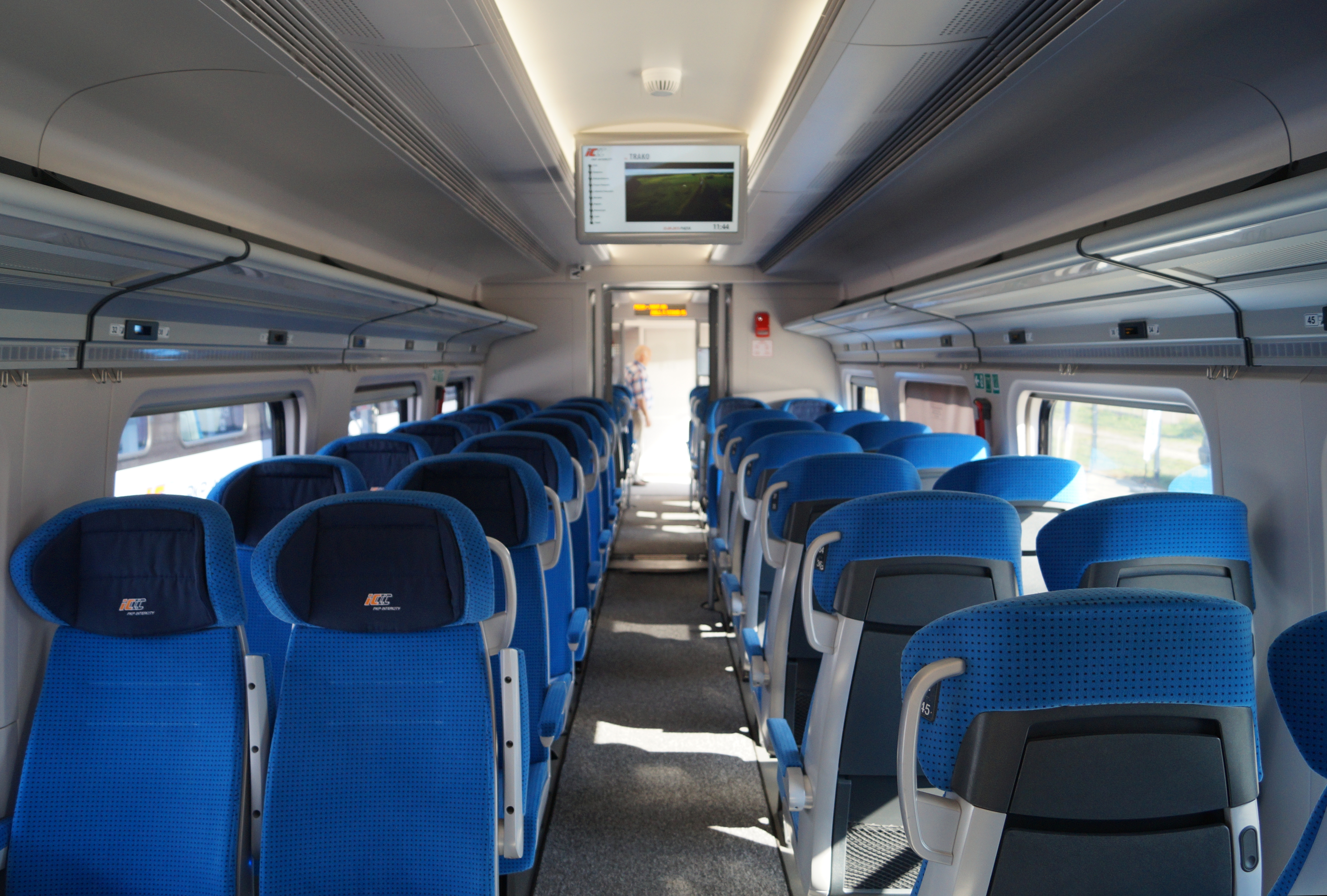 The making of this document was supported by Wikimedia Polska Association, within Wikigrant no. WG 2015-34. Przedział pasażerski w EZT serii ED161 (Pesa Dart) w barwach PKP Intercity wystawianym na Targach Trako 2015